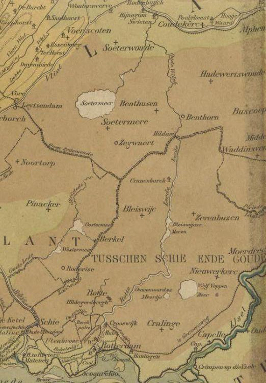 De Rotte tussen Rijn en Maas om 1300